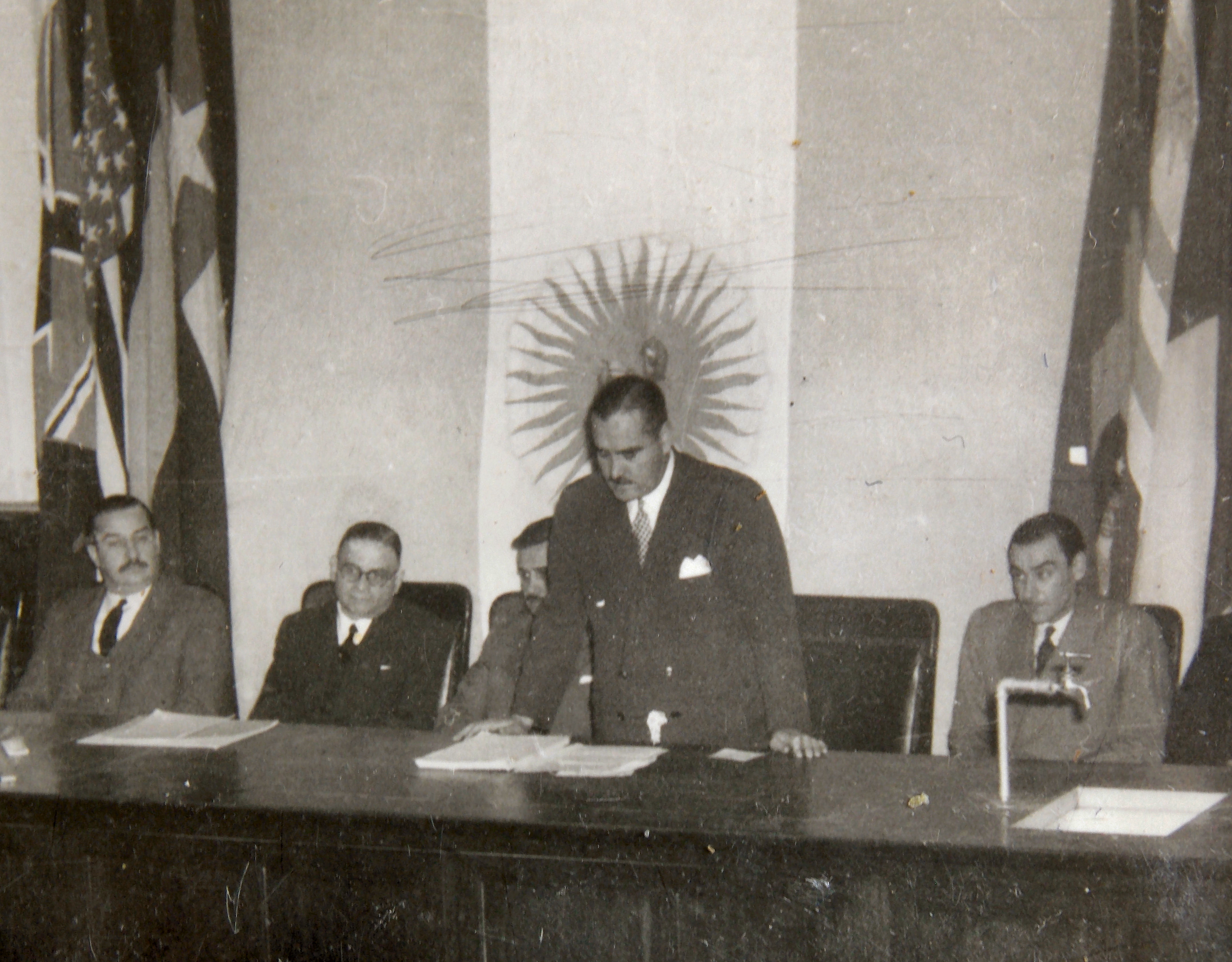 inauguración del Congreso Argentino de Cirugía Máxilo-facial, en 1953.